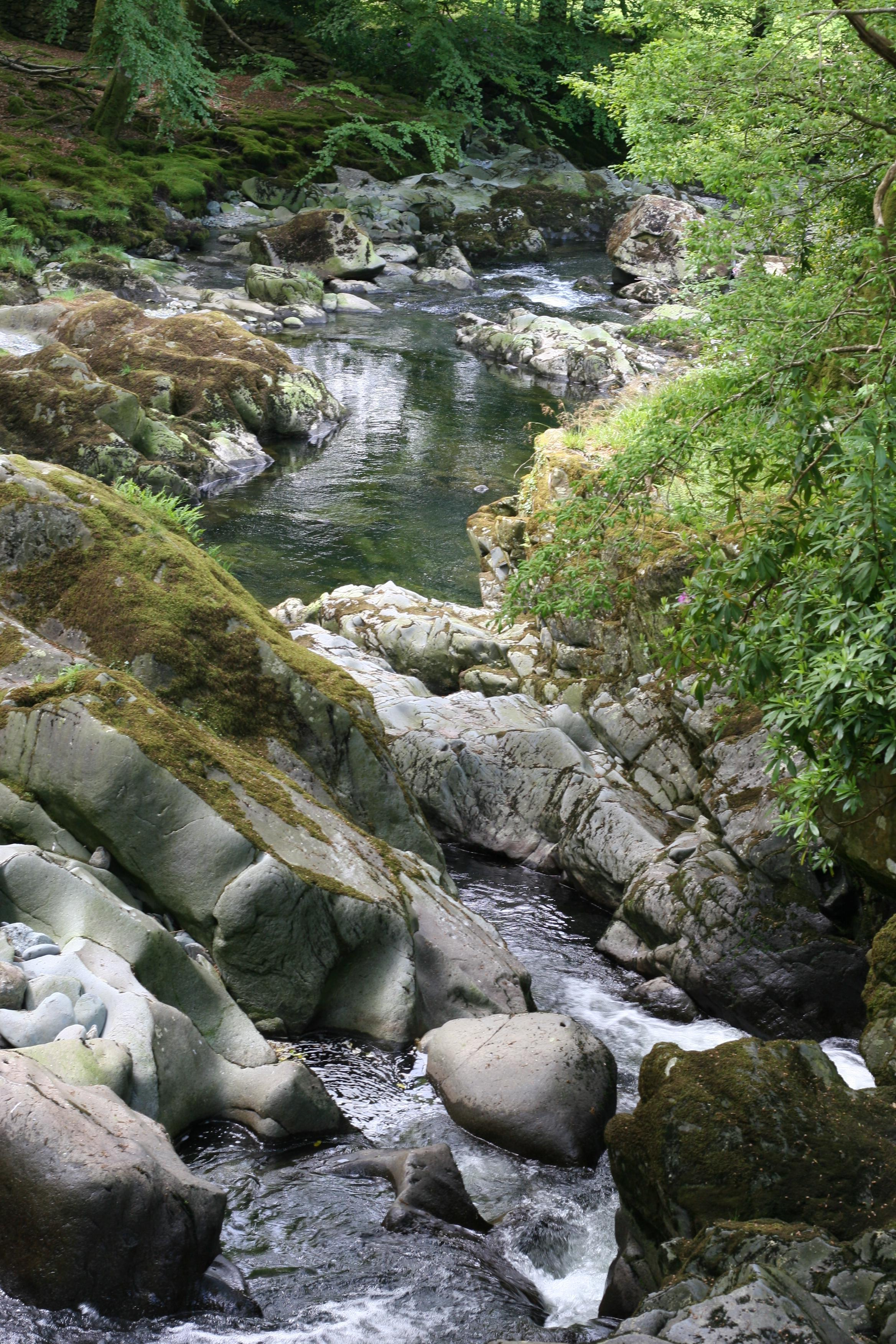 Afon Colwyn ger Beddgelert River Colwyn near Beddgelert 05/06/2006 Rhion Pritchard : own work